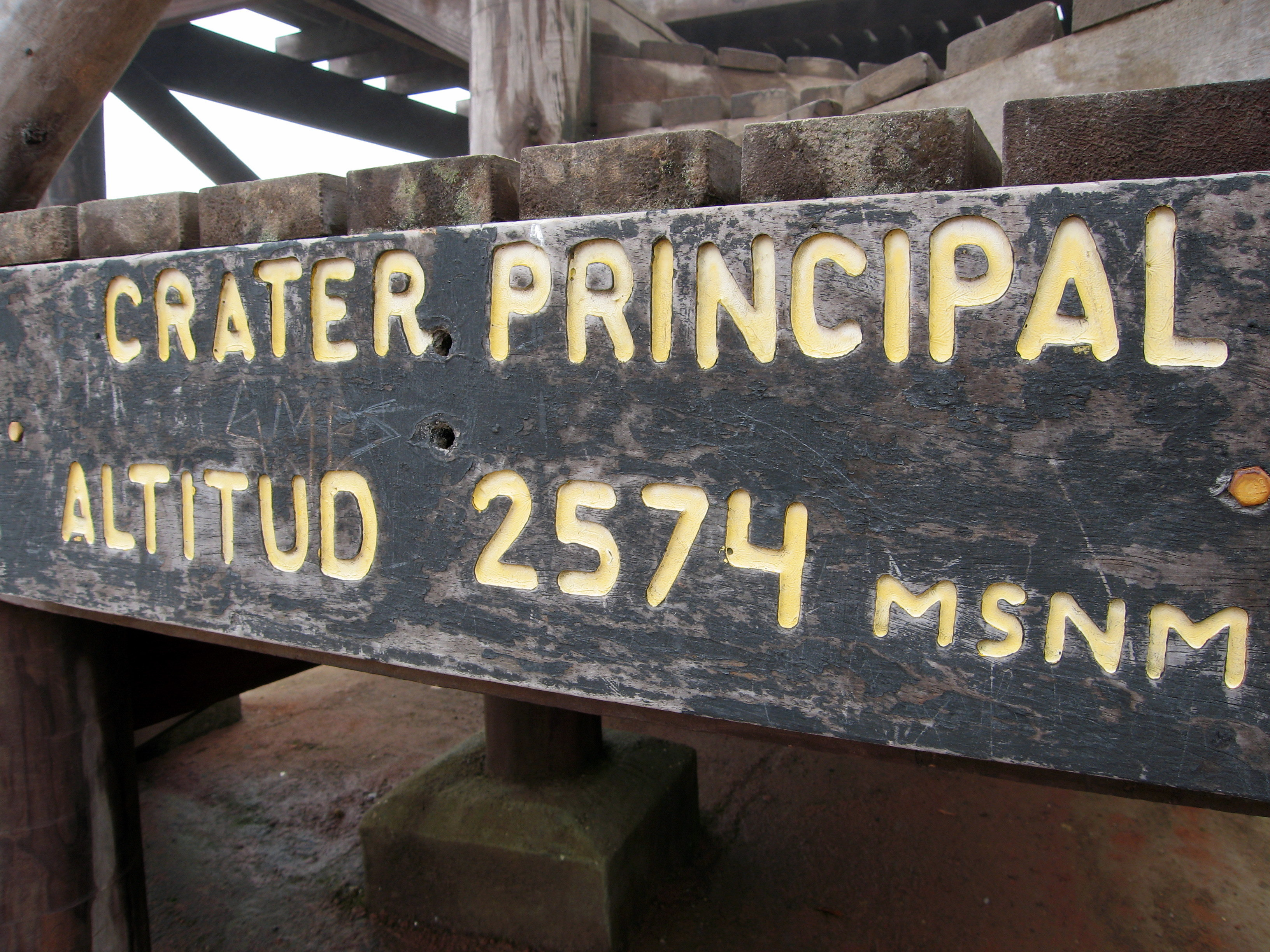 Kraterschild am Gipfel des Vulkans Poás in Costa Rica. Der Vulkan hat eine Höhe von 2574 Metern über dem Meeresspiegel.